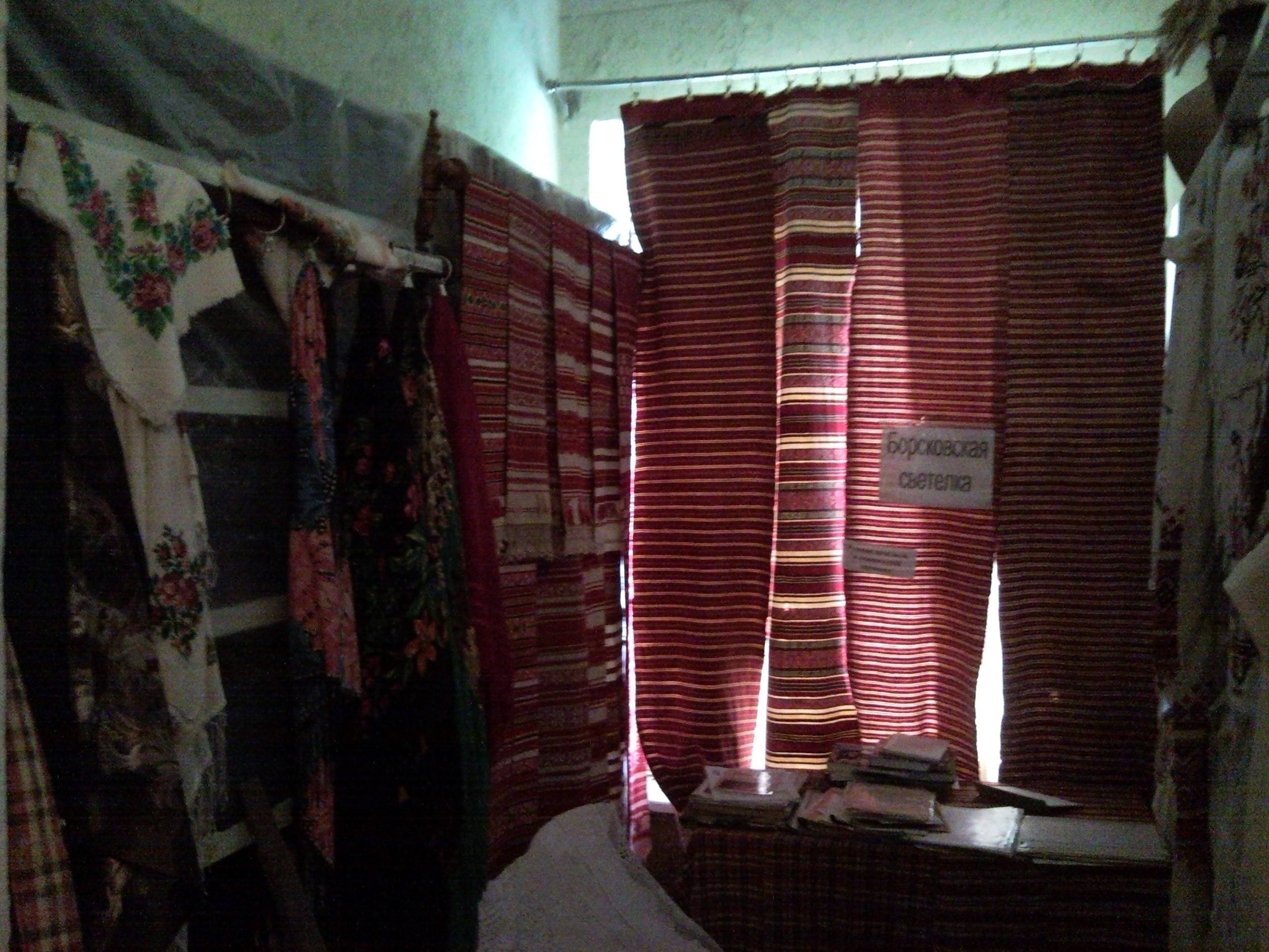 Борсків. Музейна светелка